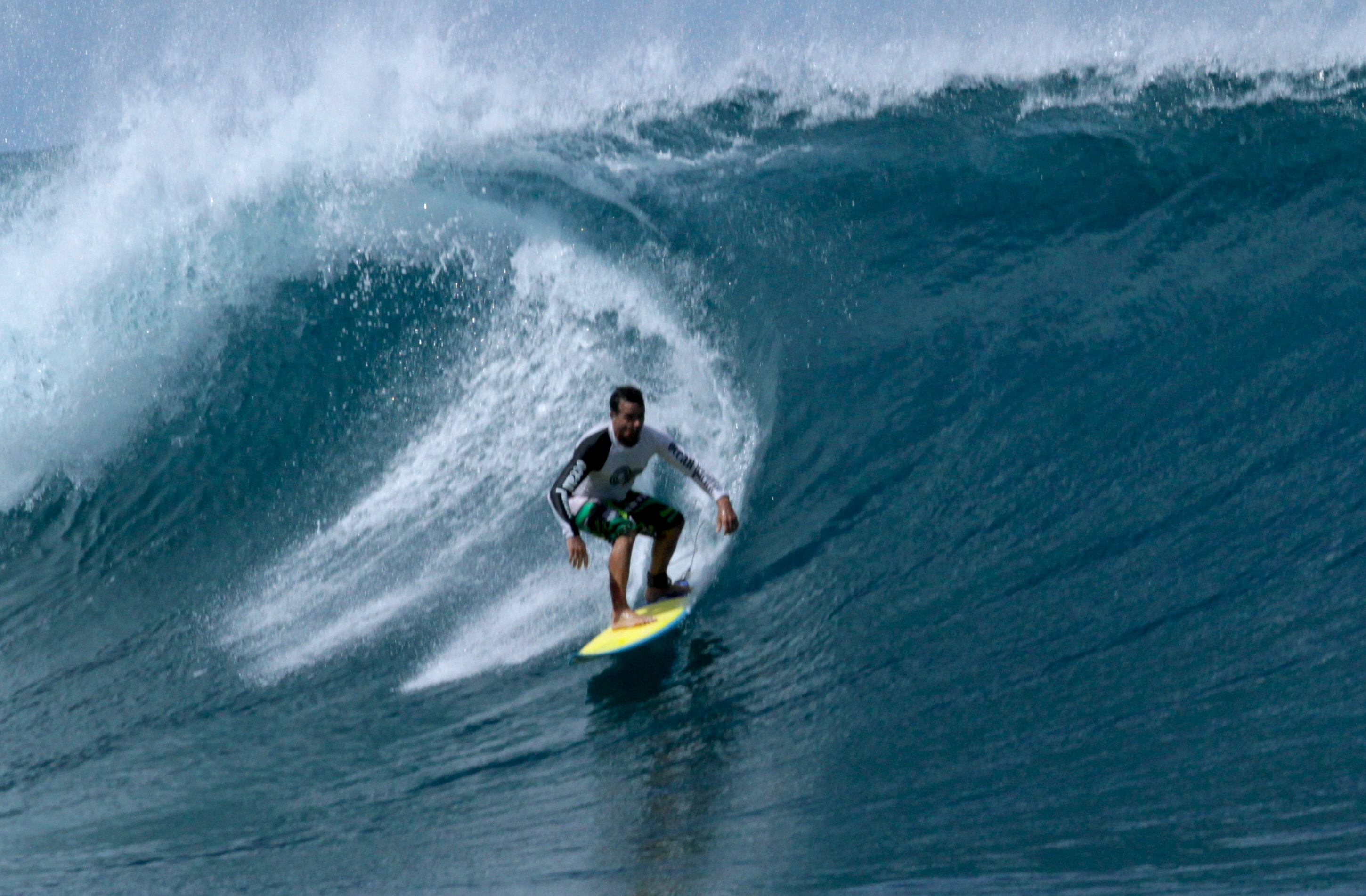 Unnamed Road, Kabupaten Nias Selatan, Sumatra Utara 22881, Indonesia